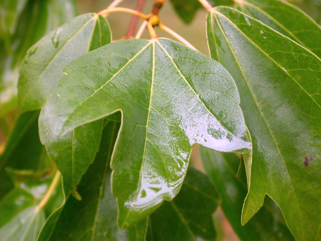 Acer buergerianum leaf